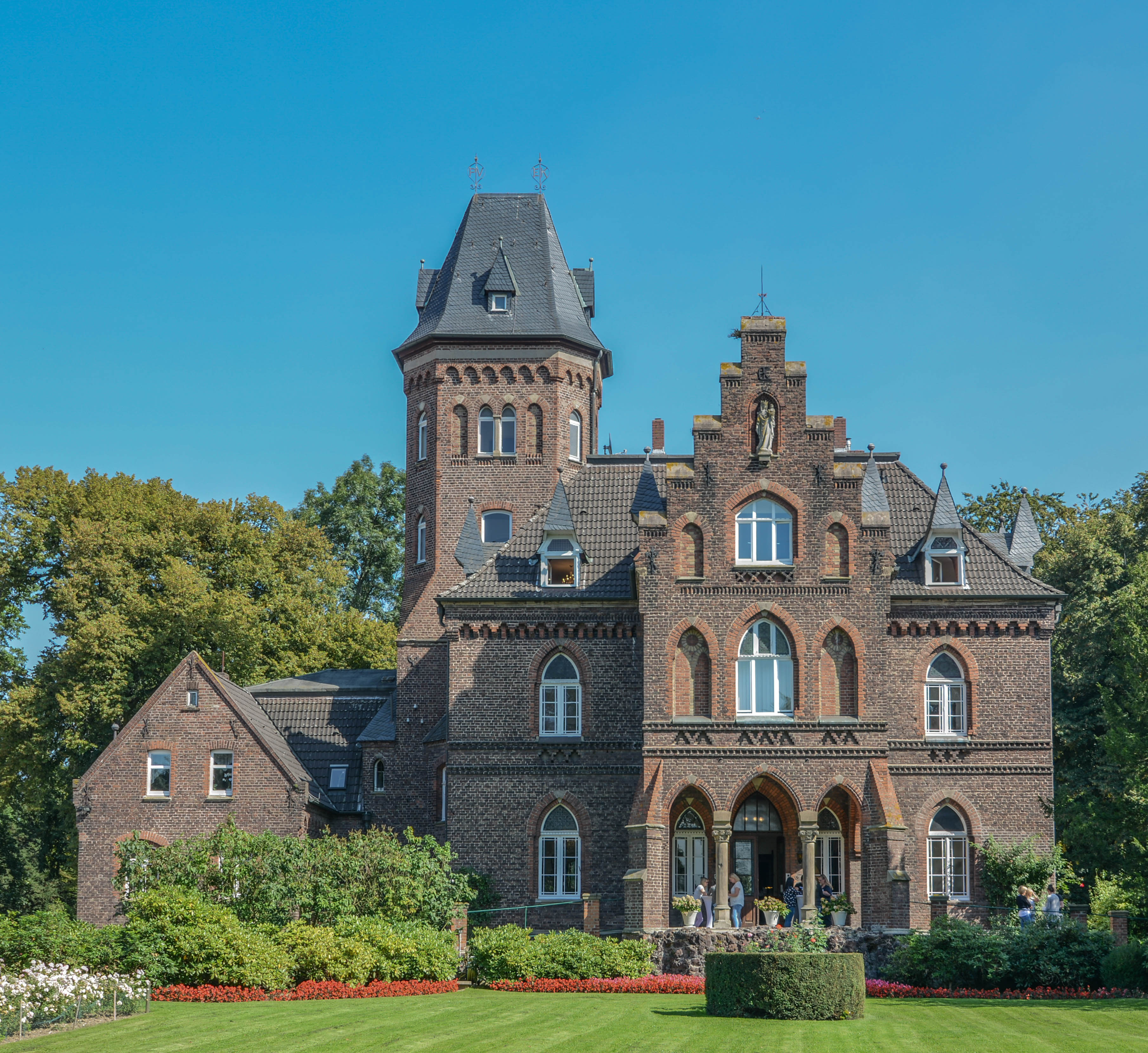 Frontansicht der Marienburg (September 2016) This is a photograph of an architectural monument.It is on the list of cultural monuments of Monheim am Rhein